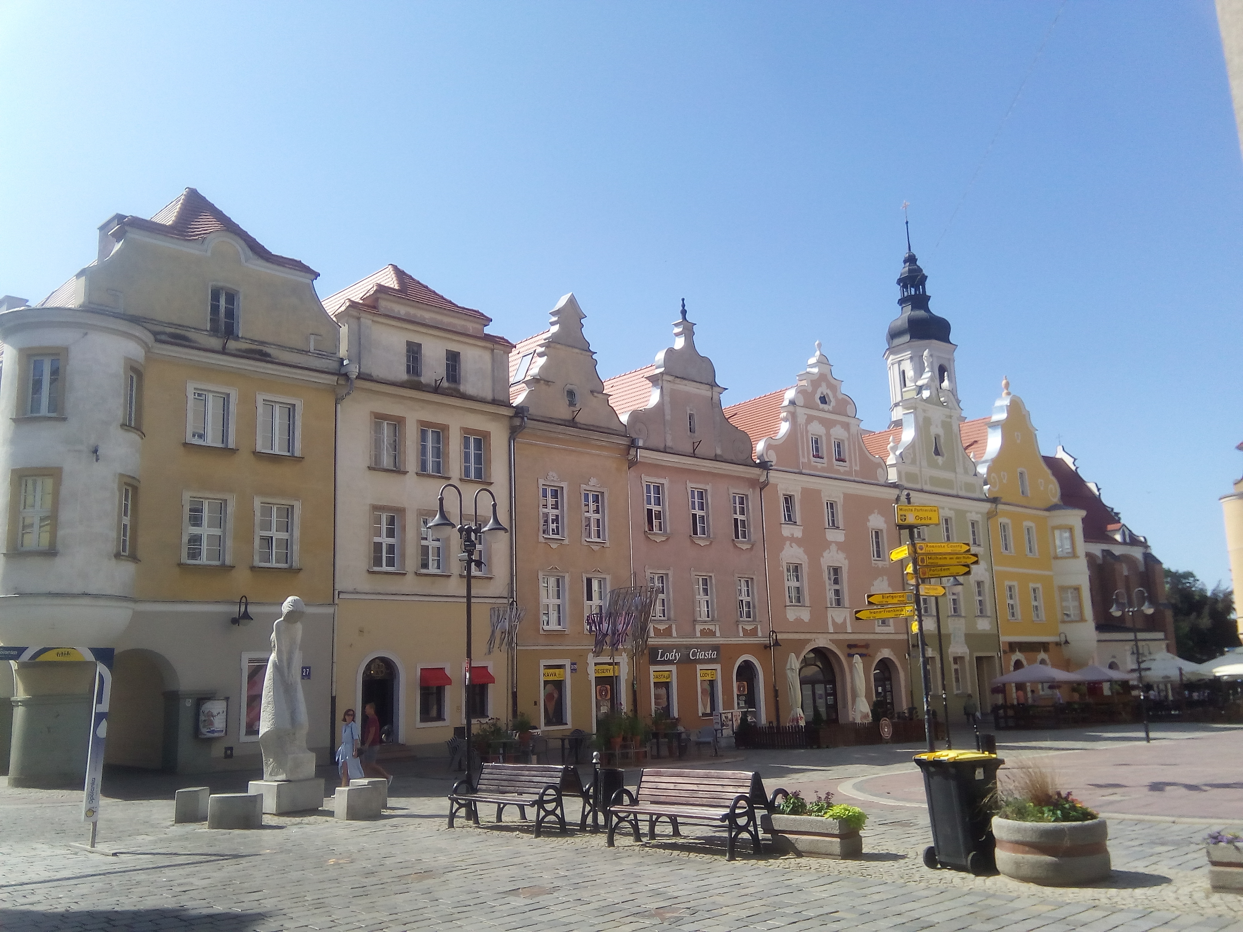 Náměstí v Opole se středověkými budovami.